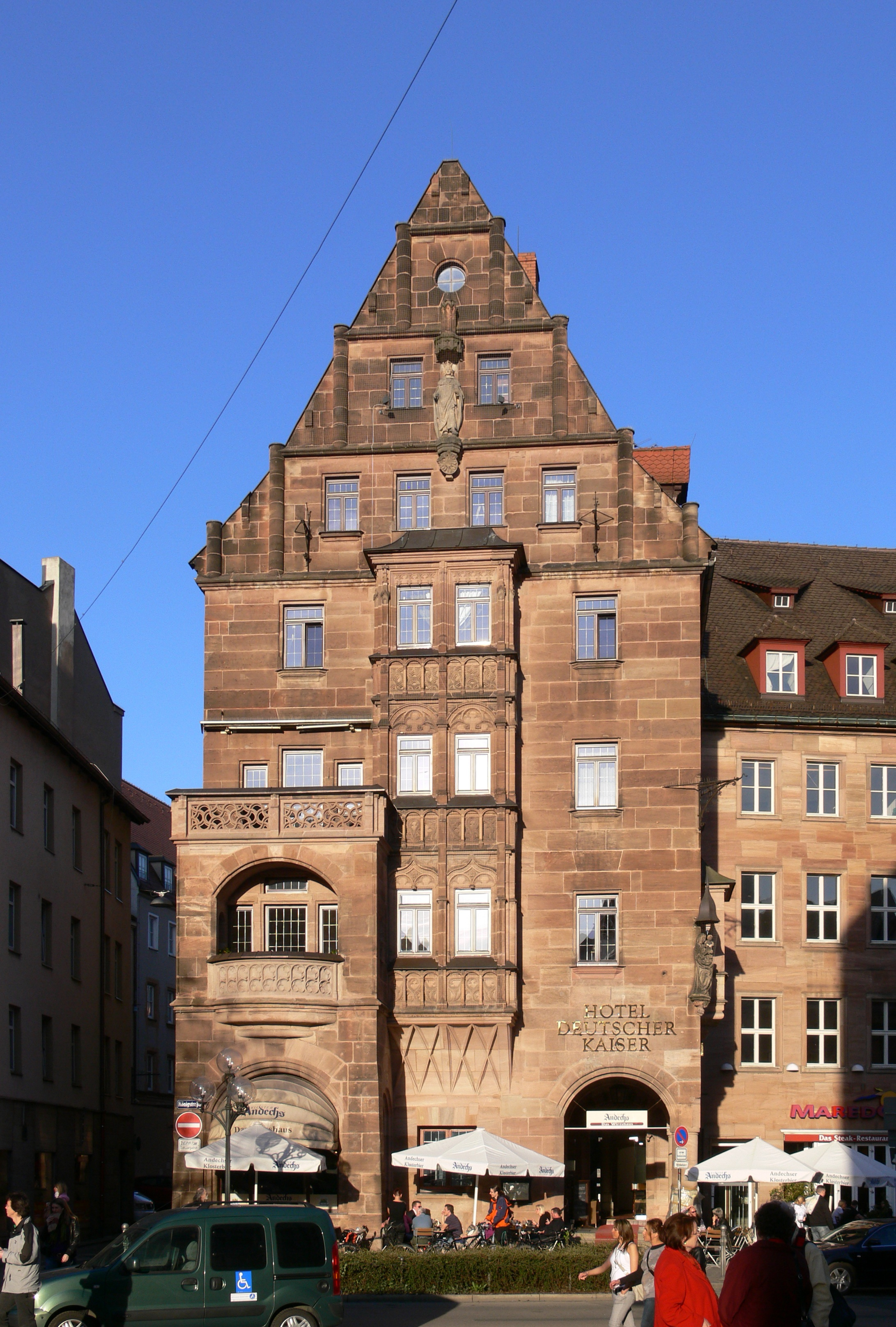 Nürnberg, Königstraße, Hotel Deutscher Kaiser, errichtet 1888–1889 von Konradin Walter